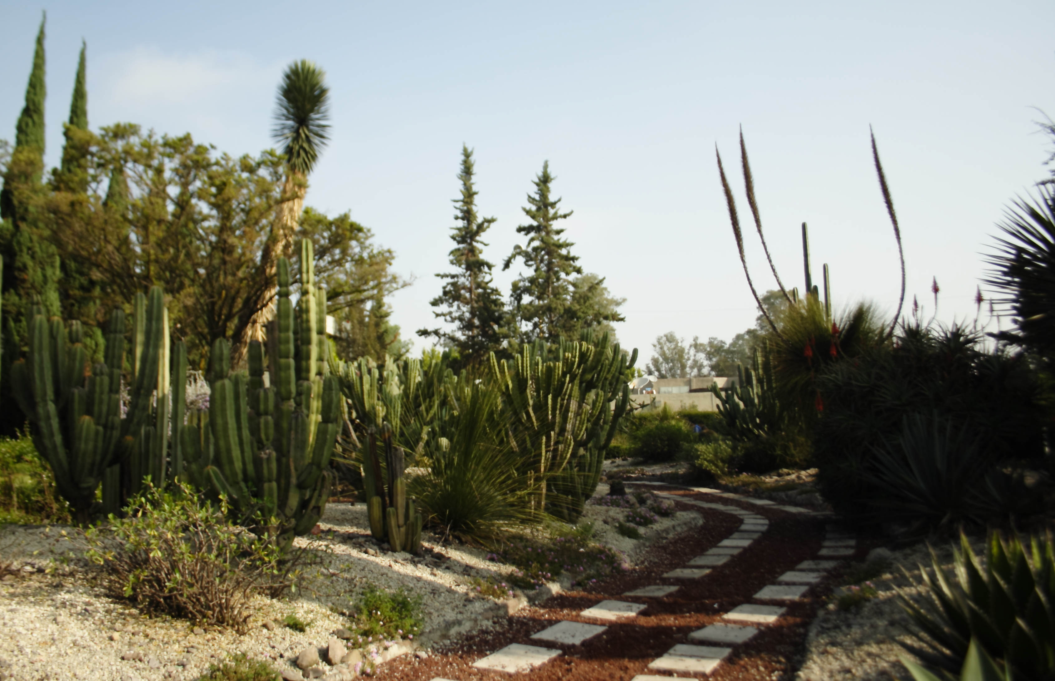 Camino entre el área de cactáceas.